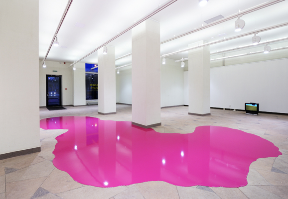 Rainer Splitt, Farbguß Vilnius (Verkehrspurpur), 2009, Pigment, Polyurethan 210 kg, Goethe Institut Vilnius